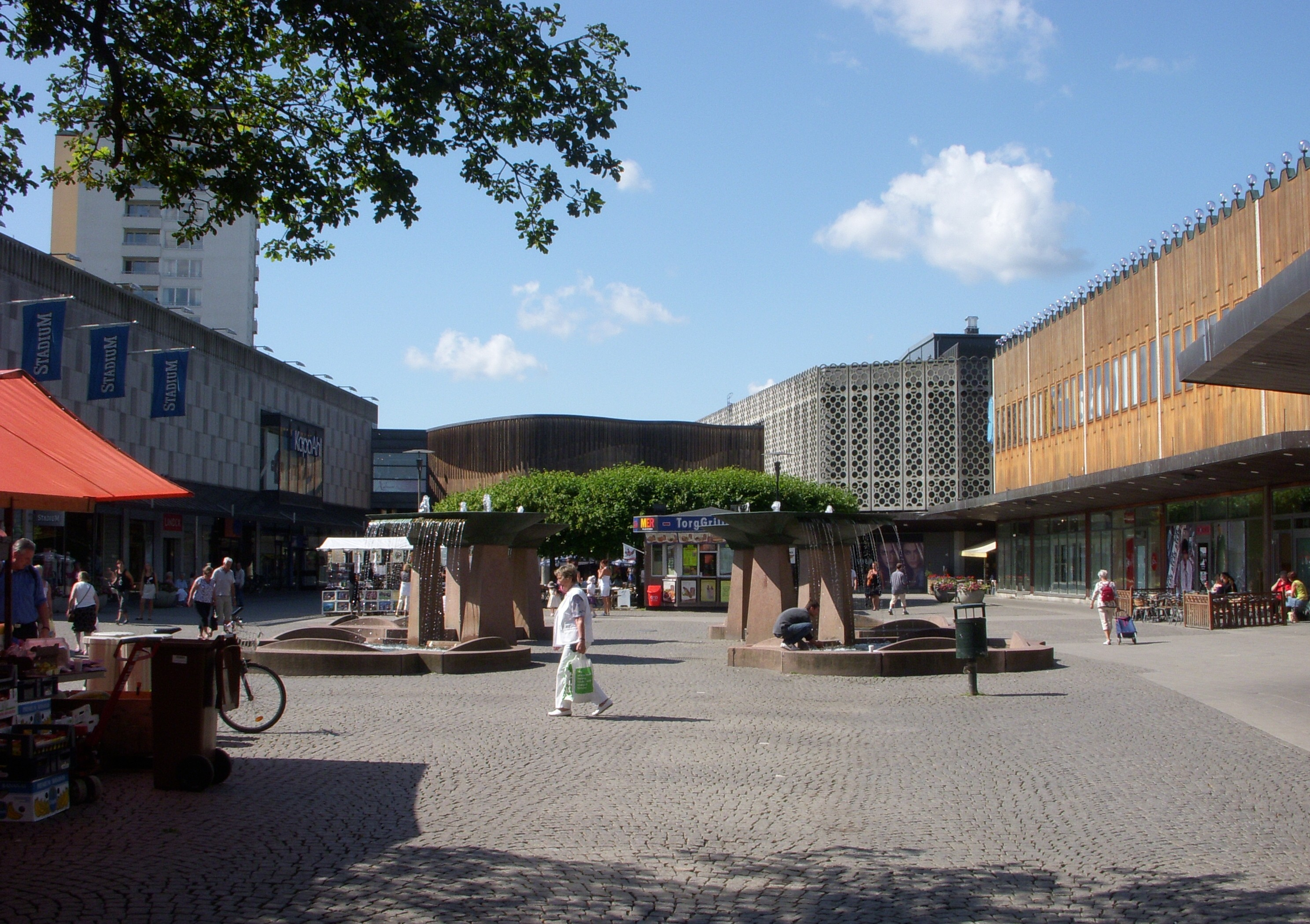 Farsta centrum i Stockholm